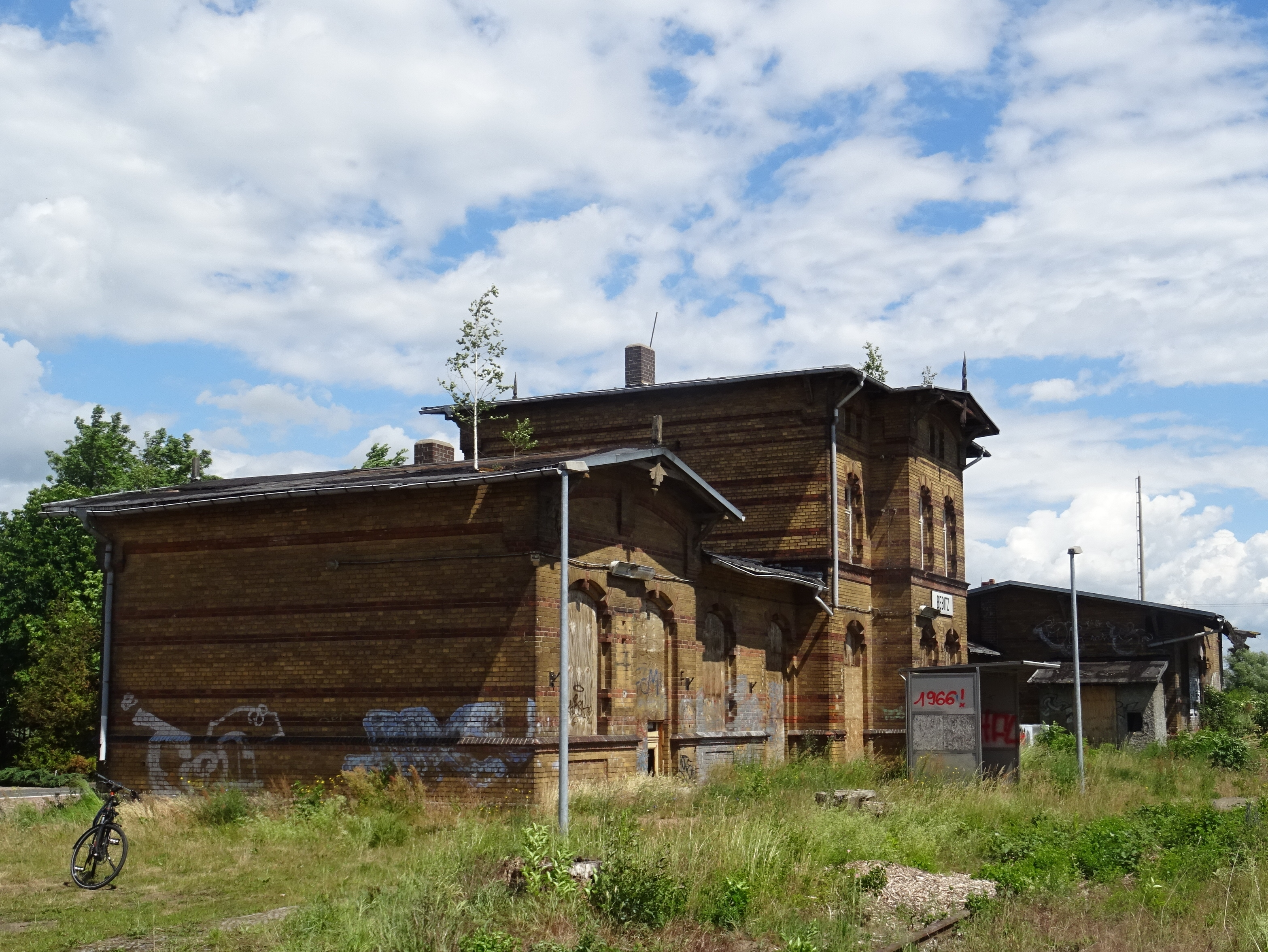 Bahnhof Bebitz, denkmalgeschütztes Empfangsgebäude, Gleisseite